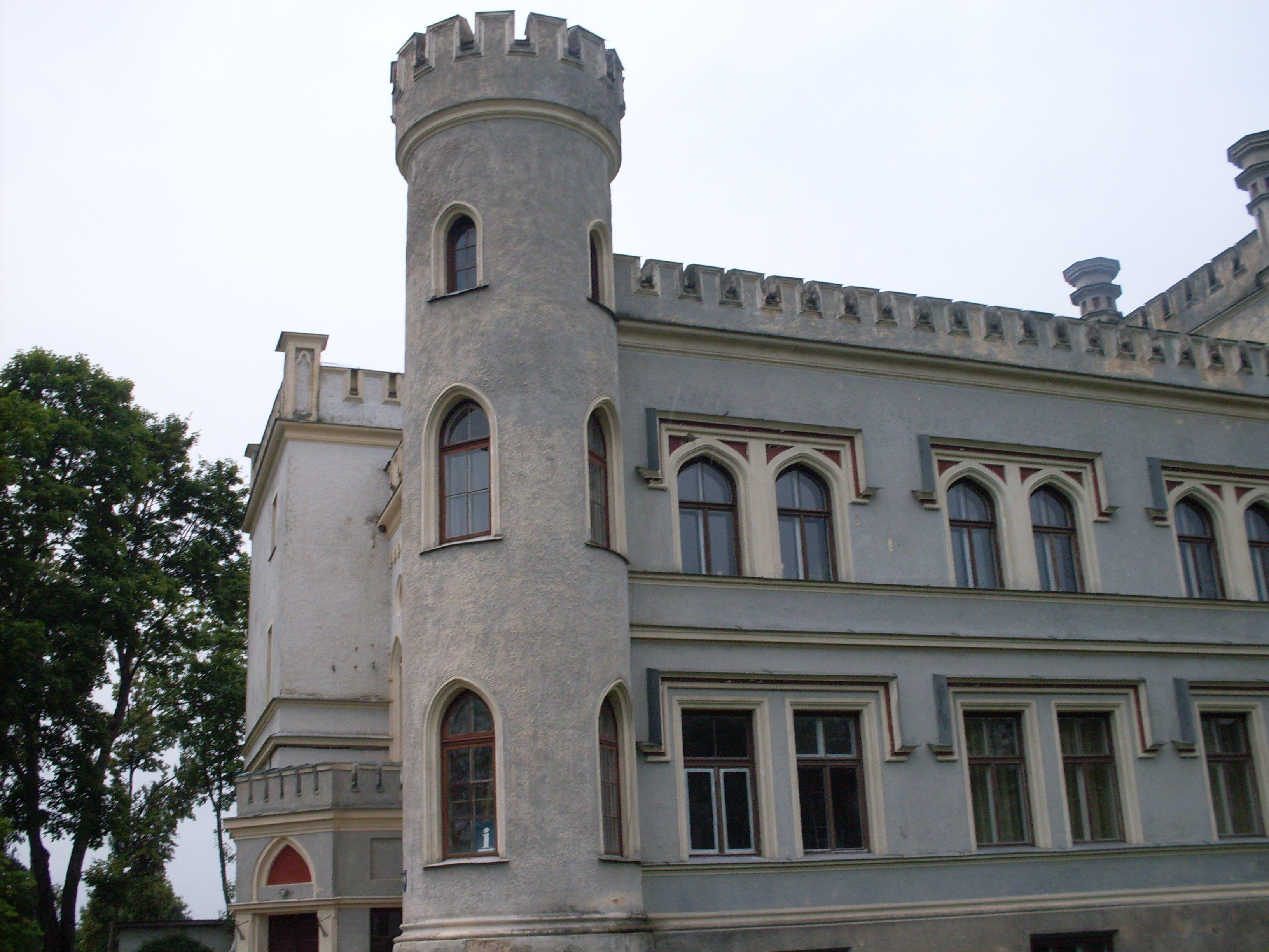 Gārsene parish, LV-5218, Latvia